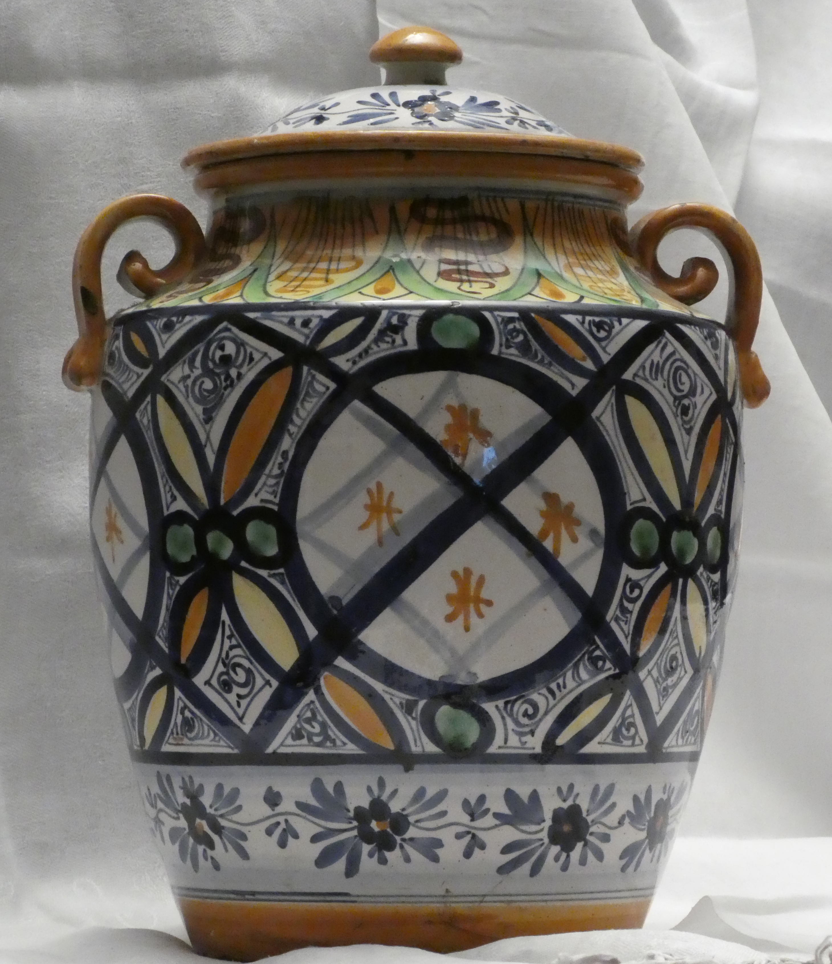 Vaso di Torquato Castellani da collezione privata